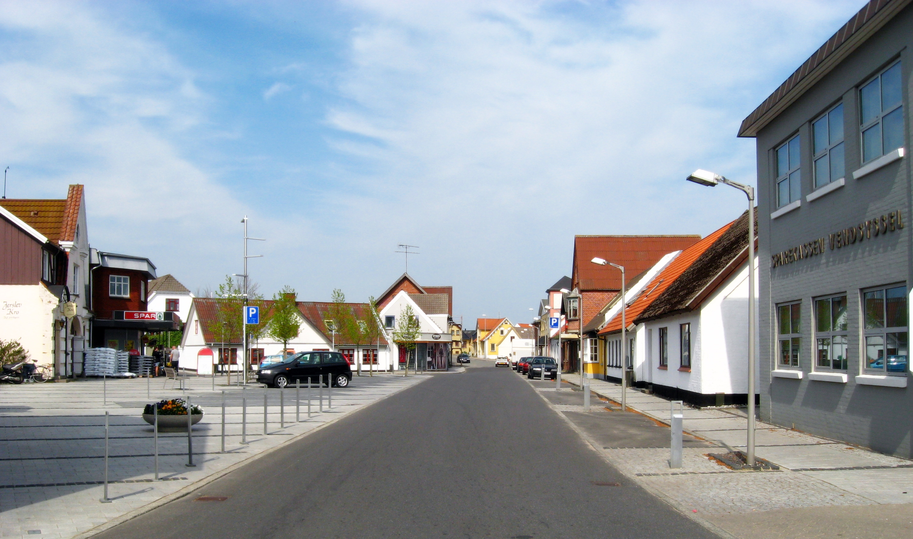 Jerslev, Brønderslev Kommune